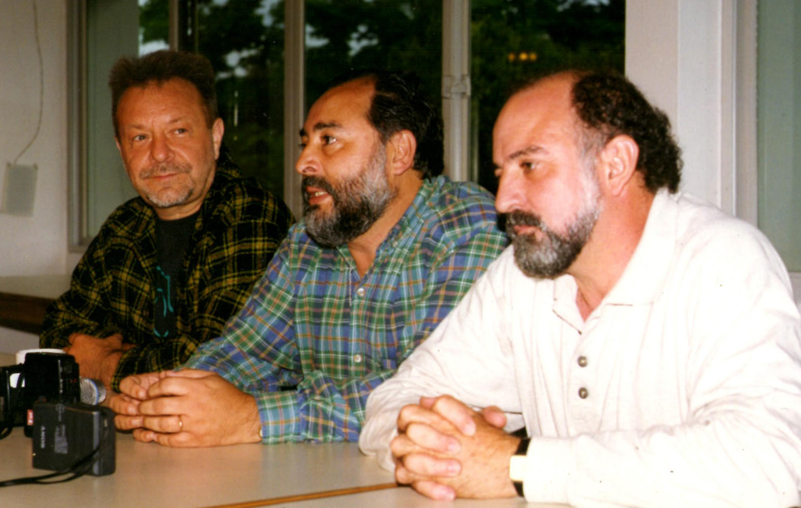 León Gieco, Eduardo Larbanois y Mario Carrero en una conferencia en la ciudad de Rosario, en la cual también participó Nito Mestre.